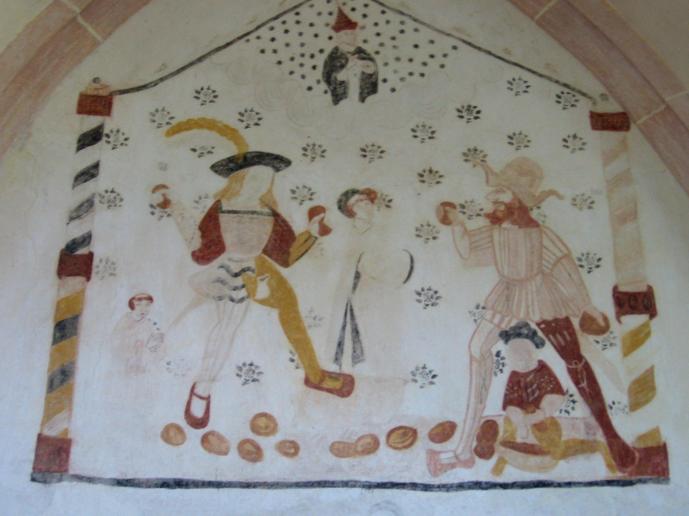 Église Saint-Pierre-et-Saint-Paul de Moutiers-en-Puisaye (Yonne, France)